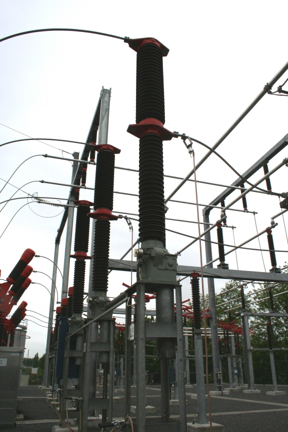 Een SF6-gevulde vermogenschakelaar op 150 kV, ELIA opleidingspost Edison